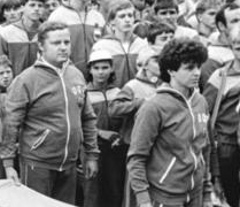 ADN-ZB Zimmermann 22.7.85 Berlin: Spartakiade-Eröffnung. Die X. Kinder- und Jugendspartakiade der DDR wurde auf dem festlich geschmückten Bebelplatz im Zentrum der Hauptstadt eröffnet. Prominente und erfolgreiche Sportler früherer Jahre wie Thomas Munkelt, Bärbel Wöckel, Lothar Thoms, Bernd Drogan, (vorn v.r.n.l.) und Waldemar Cierpinski, Brigitte Wujak, Jürgen Wiefel, Jochen Bachfeld (hintere Reihe v.r.n.l.) trugen die Staatsflagge der DDR auf den tradtitionsreichen Platz.